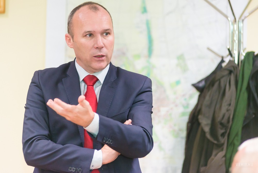 Porga Gyula (Enying, 1968. április 17. –) politikus, Veszprém polgármestere, korábban alpolgármestere, a humán ügyek felelőse.